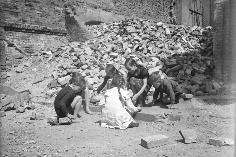 ADN-Zentralbild Zum Kotikow-Befehl Nr. 20 vom 23.6.1948. Punkt 12 dieses Befehls beauftragt die Bezirksämter des Sowjetischen Sektors von Berlin bis zum 1. Oktober 1948 die werktätige Bevölkerung aus den Kellern und Ruinen in menschenwürdige Wohnverhältnisse zu bringen. Dazu gehört auch, dass die Kinder wieder Spielplätze bekommen und ihr Ruinendasein beendet wird.